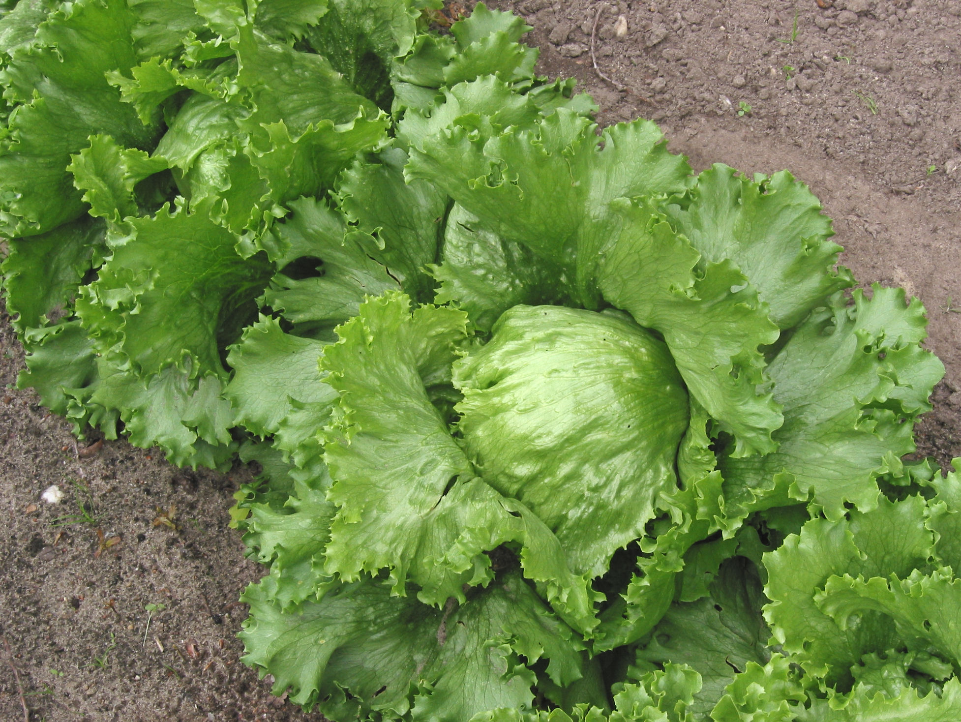 (nl: IJssla krop)Iceberg lettuce